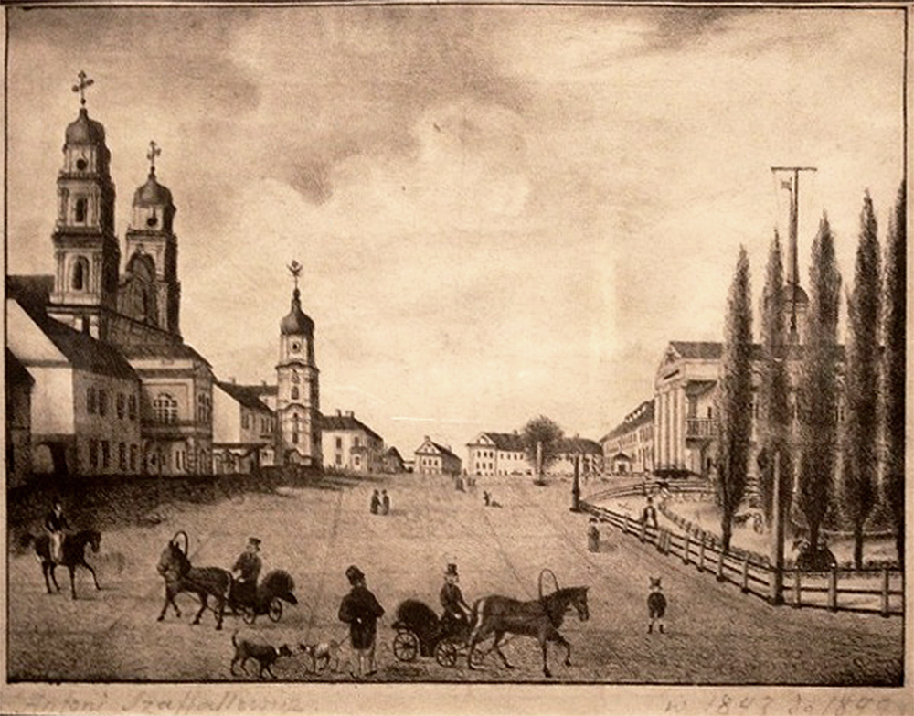 Беларуская (тарашкевіца): Менск (Miensk), пляц Высокі Рынак (plac Vysoki Rynak). Катэдра і калегіюм езуітаў.